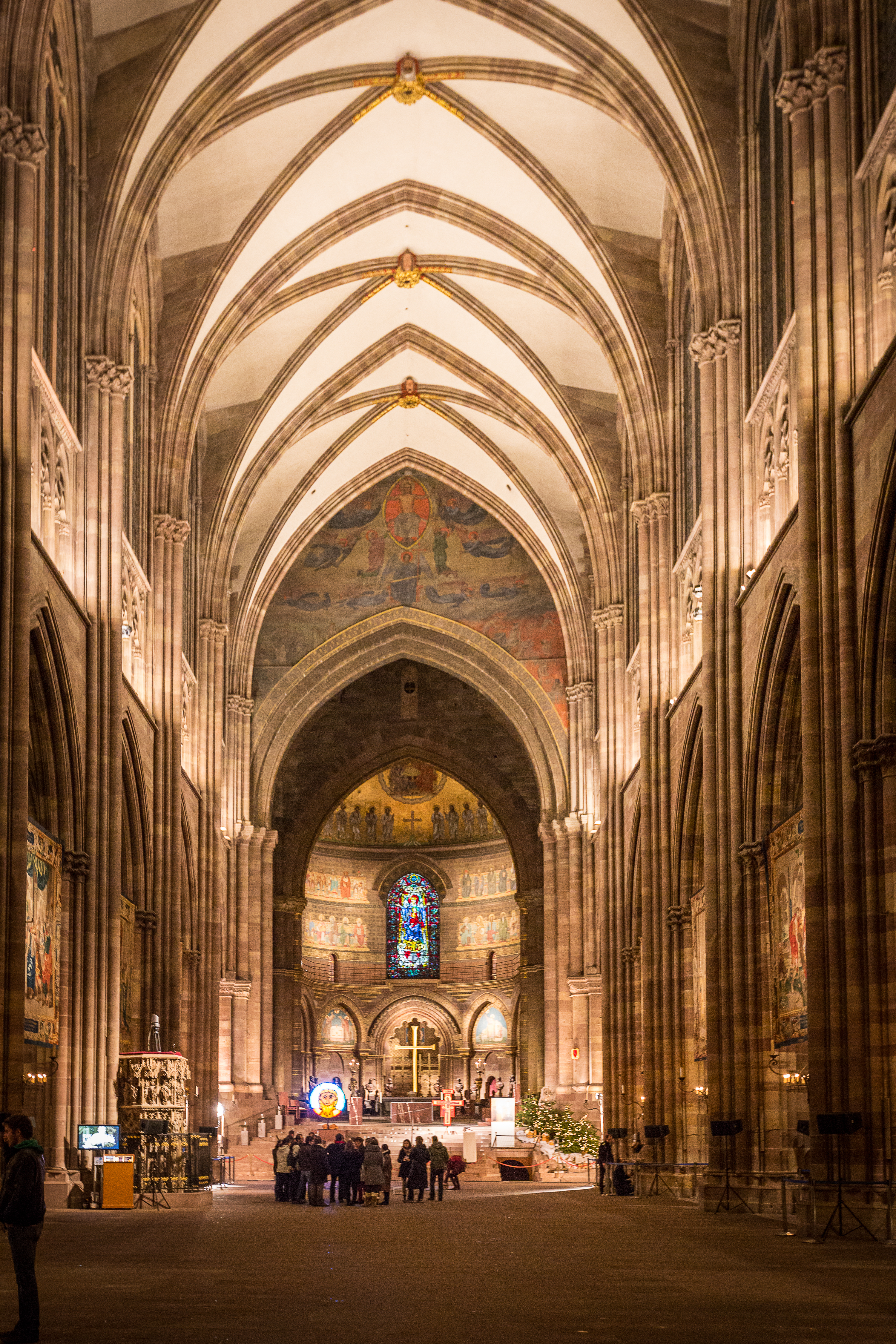 36e rencontres internationales de Taizé Strasbourg 28 décembre 2013